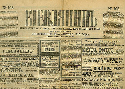 Газета "Киевлянин"